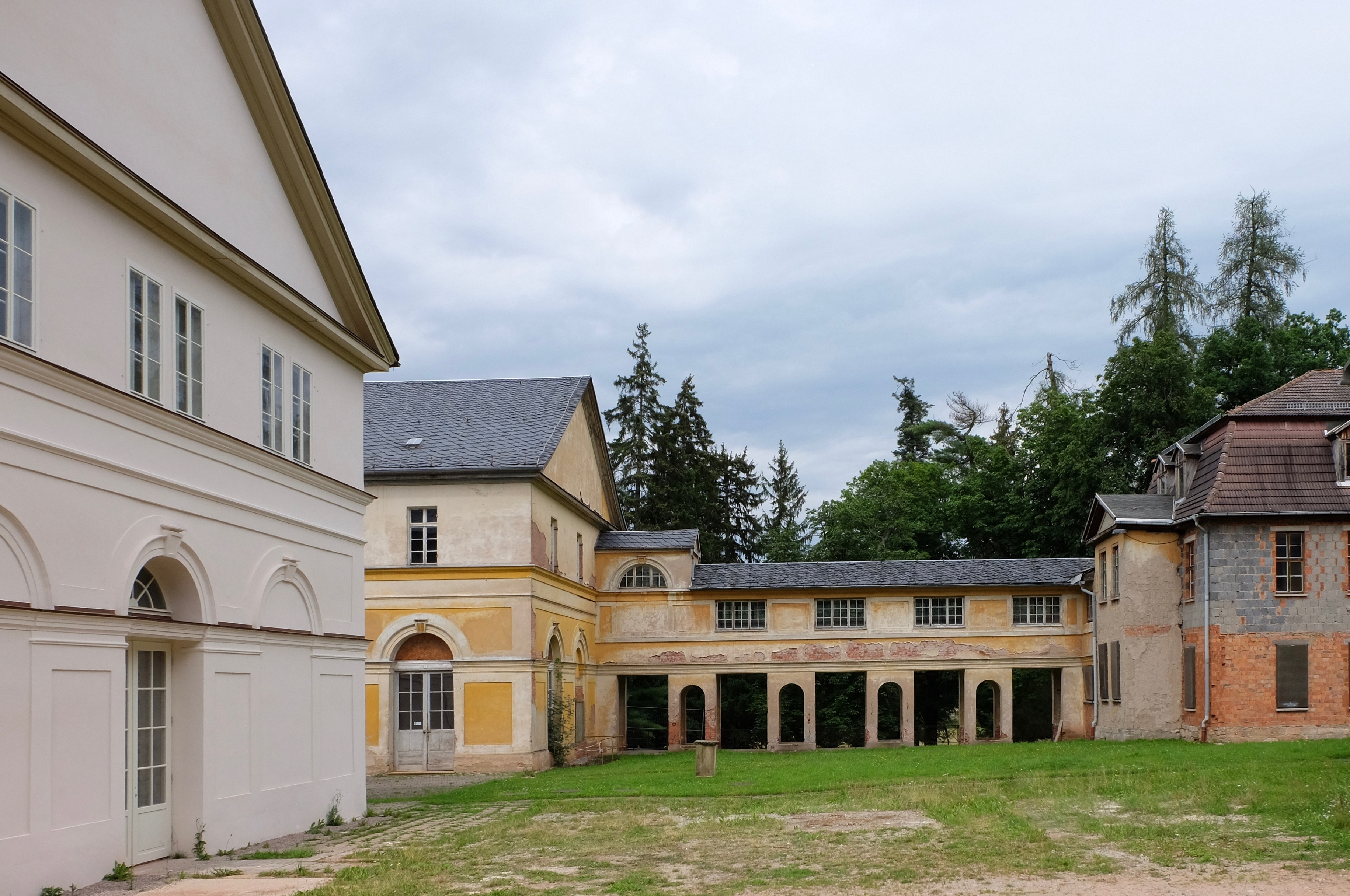 Der Prinzengang zwischen Prinzenhaus und Pavillion